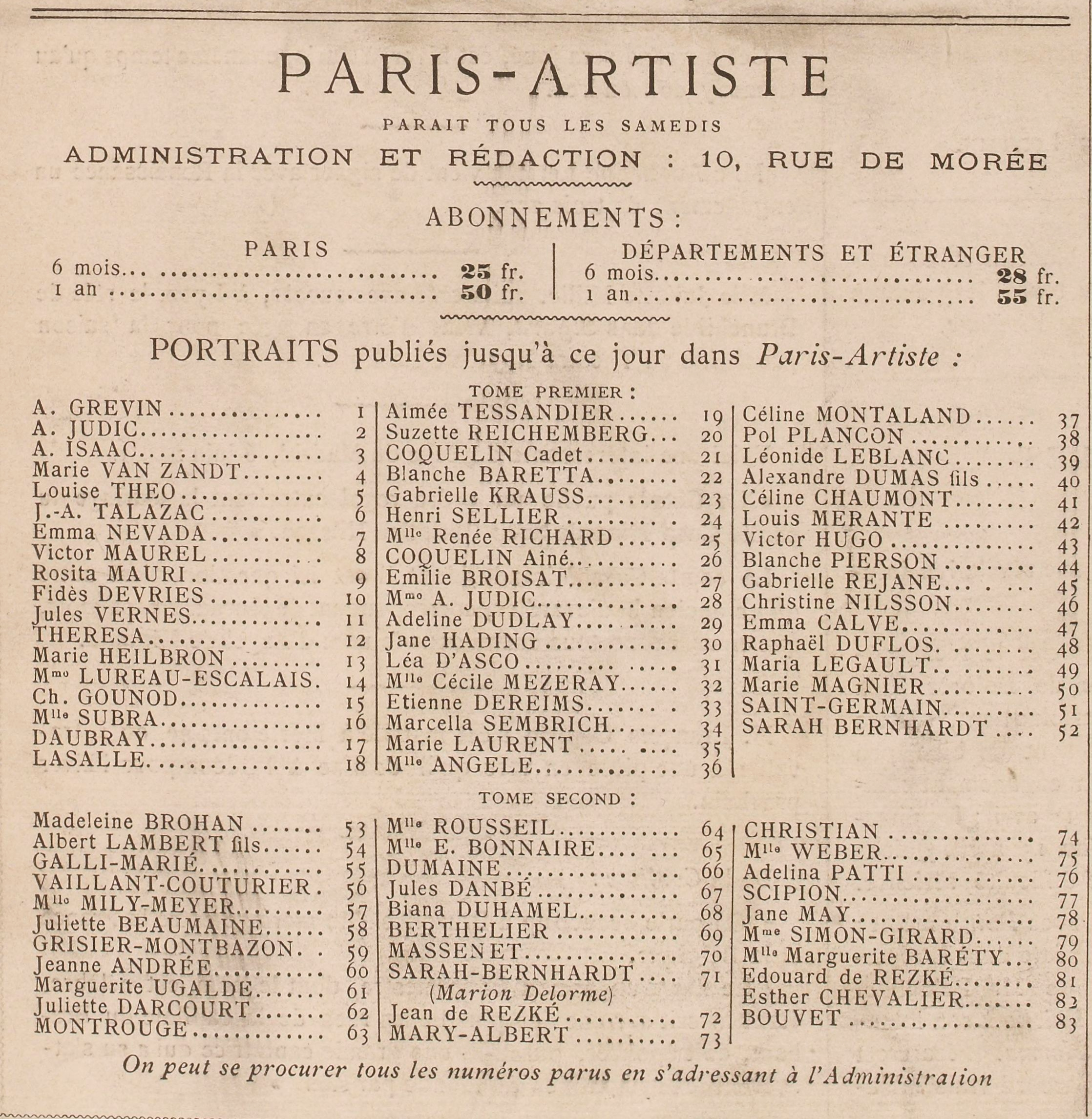 Paris-Artiste n°85 (1886) - extrait : 4éme page, liste des personnages représentés dans les 85 n° parus.